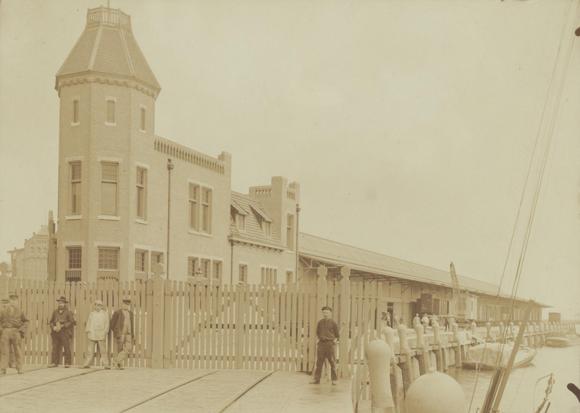 Beschrijving Goederenloods met kantoor van de Holland-Amerikalijn op het Stenen Hoofd, Westerdoksdijk 44 Foto uit een losbladig album met 18 foto's van de Amsterdamse haven, aangeboden aan Petrus Wilhelmus Cornelis de Graaf, oud-ingenieur en hoofd van de Afdeling Havenwerken van de Gemeente Amsterdam, ter herinnering aan de 25-jarige ambtsvervulling (1882-1907). Documenttype foto Vervaardiger Onbekend Anoniem Collectie Collectie Stadsarchief Amsterdam: albums Datering 1907 ca. Geografische naam Westerdoksdijk Inventarissen Afbeeldingsbestand ABBB00008000017